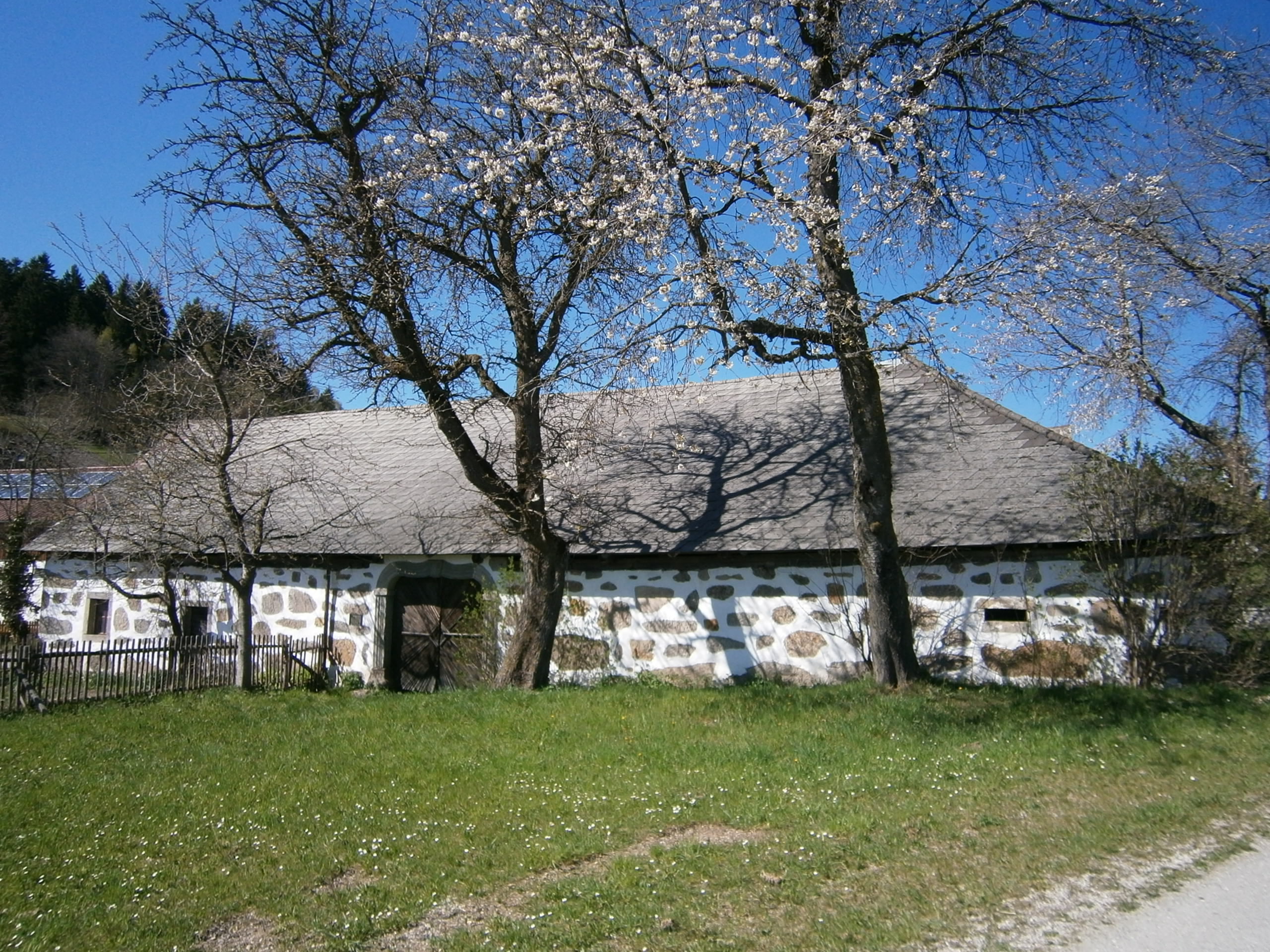 Object location48° 30′ 28.91″ N, 14° 43′ 24.79″ E